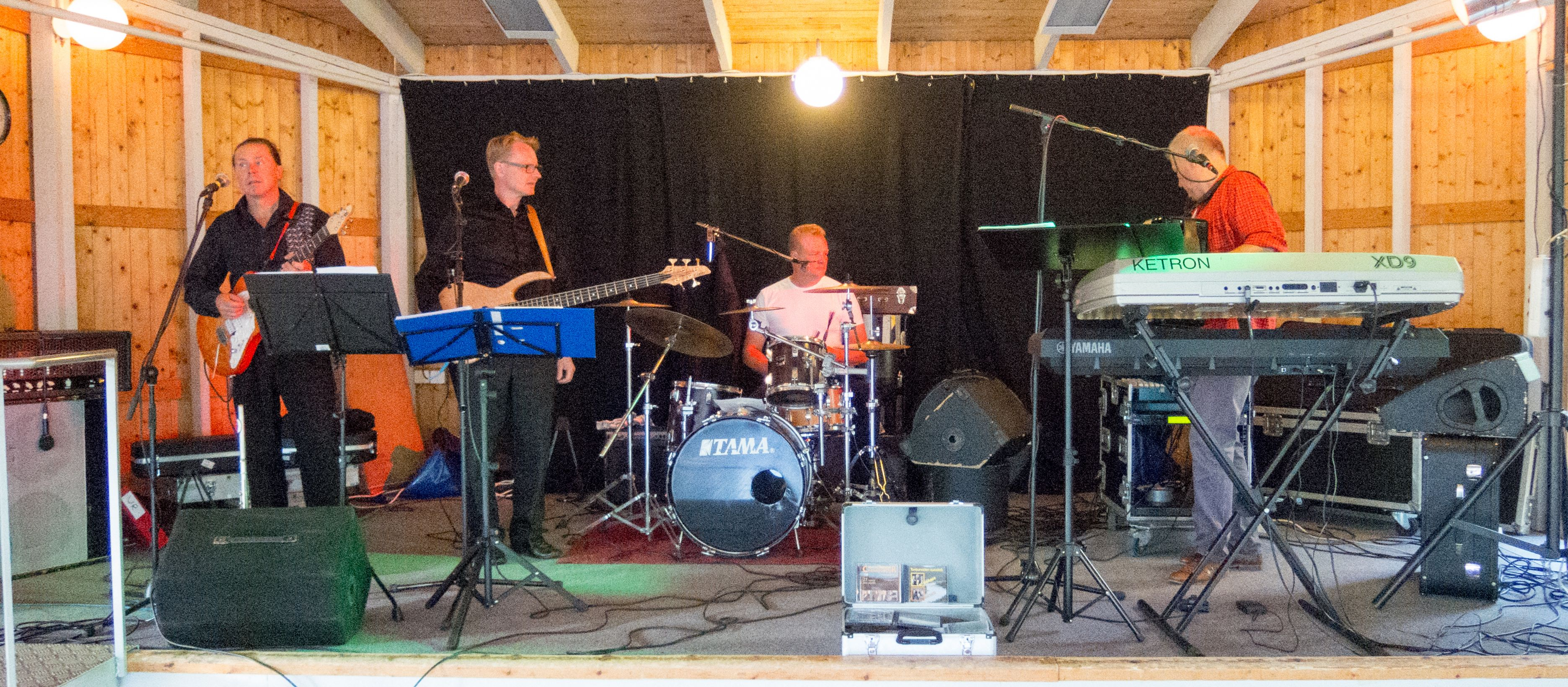 Channel four suomalainen yhtye